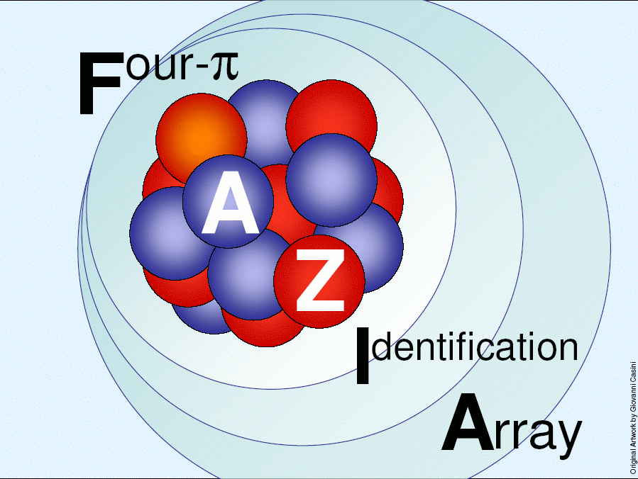 FAZIA logo